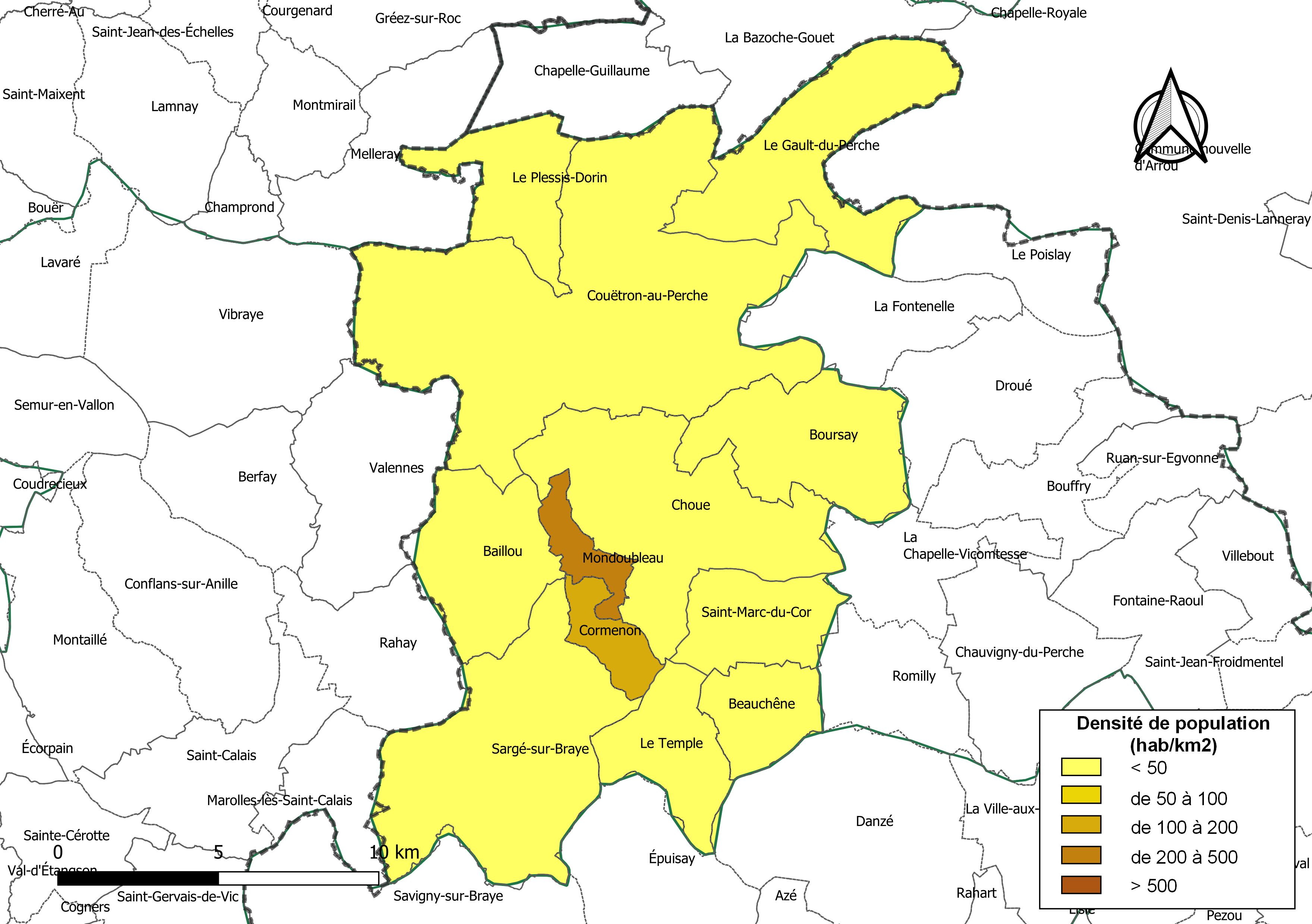 Carte des densités de population (millésimée 2016) des communes de la communauté de communes la Communauté de communes des Collines du Perche, département de Loir-et-Cher, France. Composition au 1er janvier 2019.